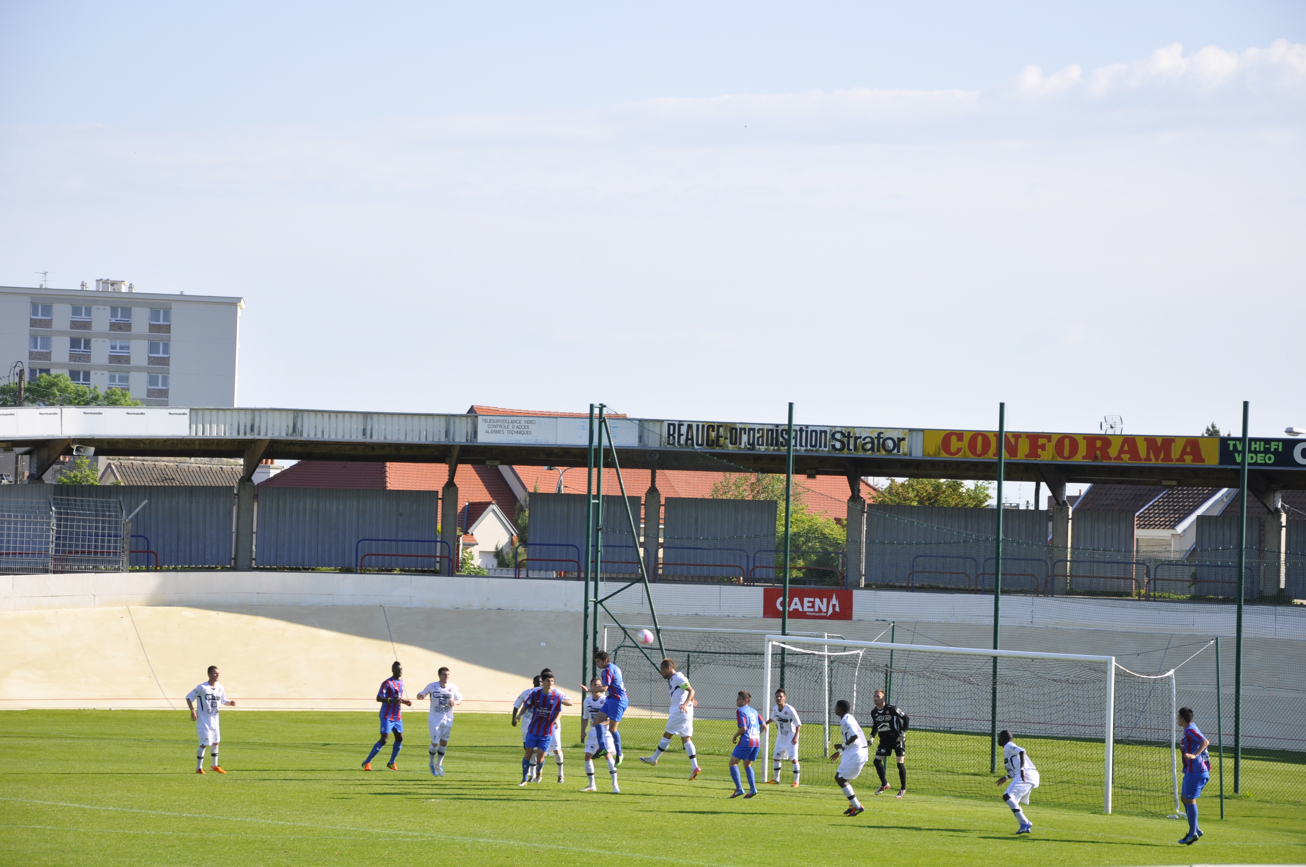 Match entre la réserve du SM Caen et La Vitréenne